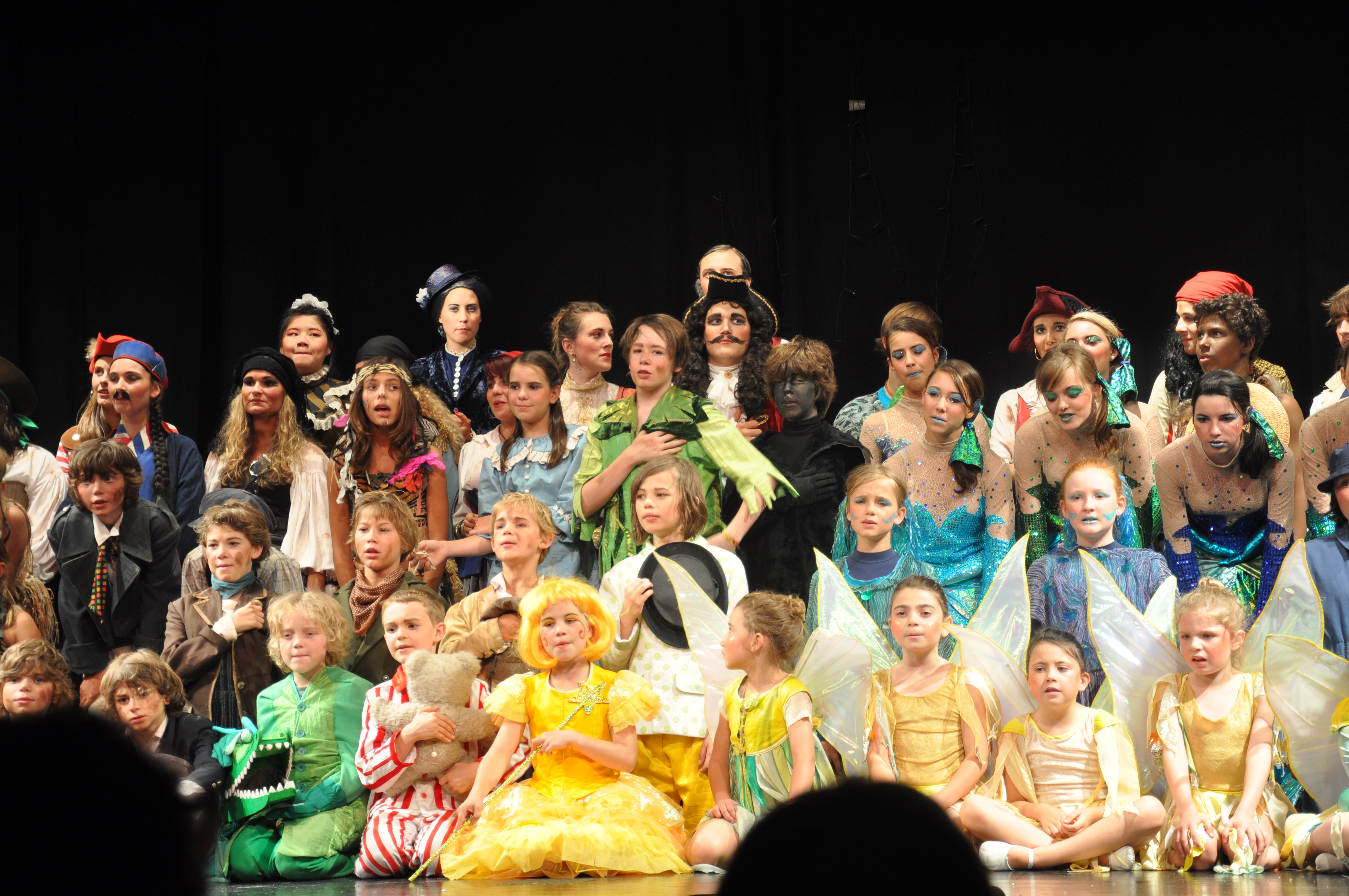 Rutenfest Ravensburg 2011, Schlussapplaus beim Rutentheater 2011 "Peter Pan" (Besetzung „rot“) – traditionell mit dem Singen des Ravensburger Heimatlieds